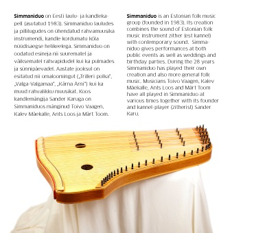 Simmaniduo Tule simmanile sisekülg